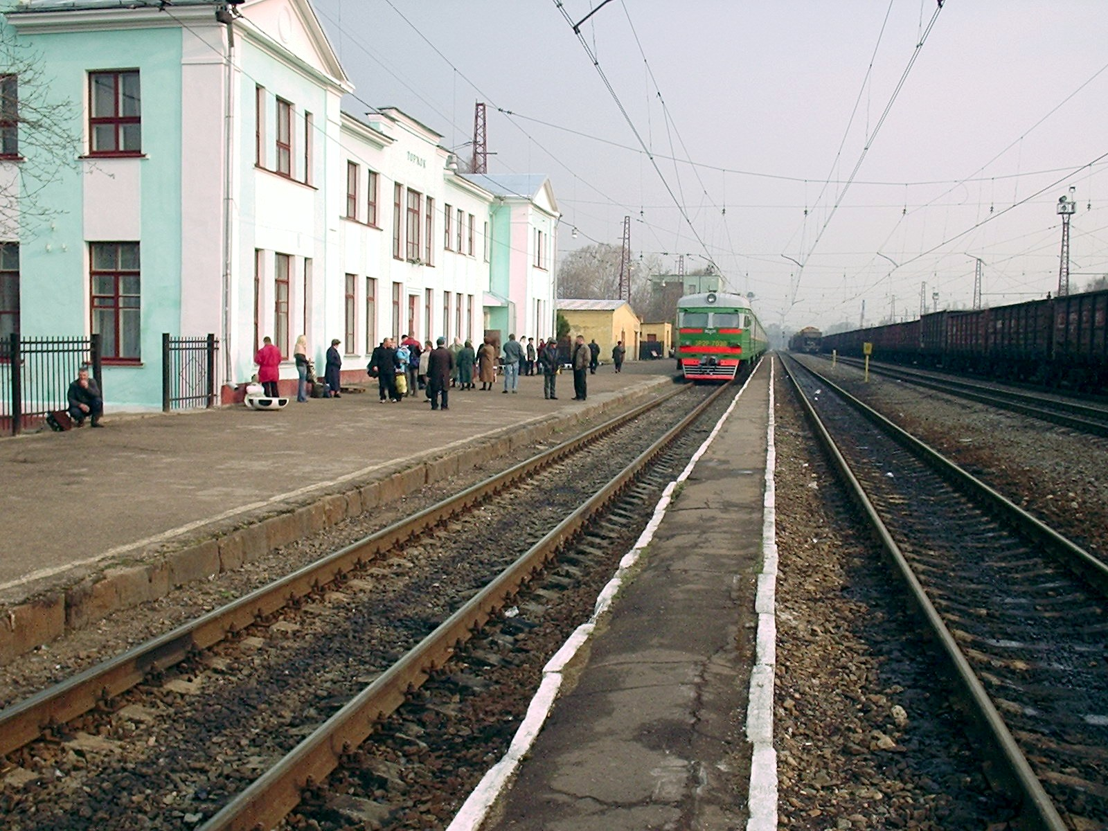 Железнодорожная станция Торжок (Октябрьская ЖД)